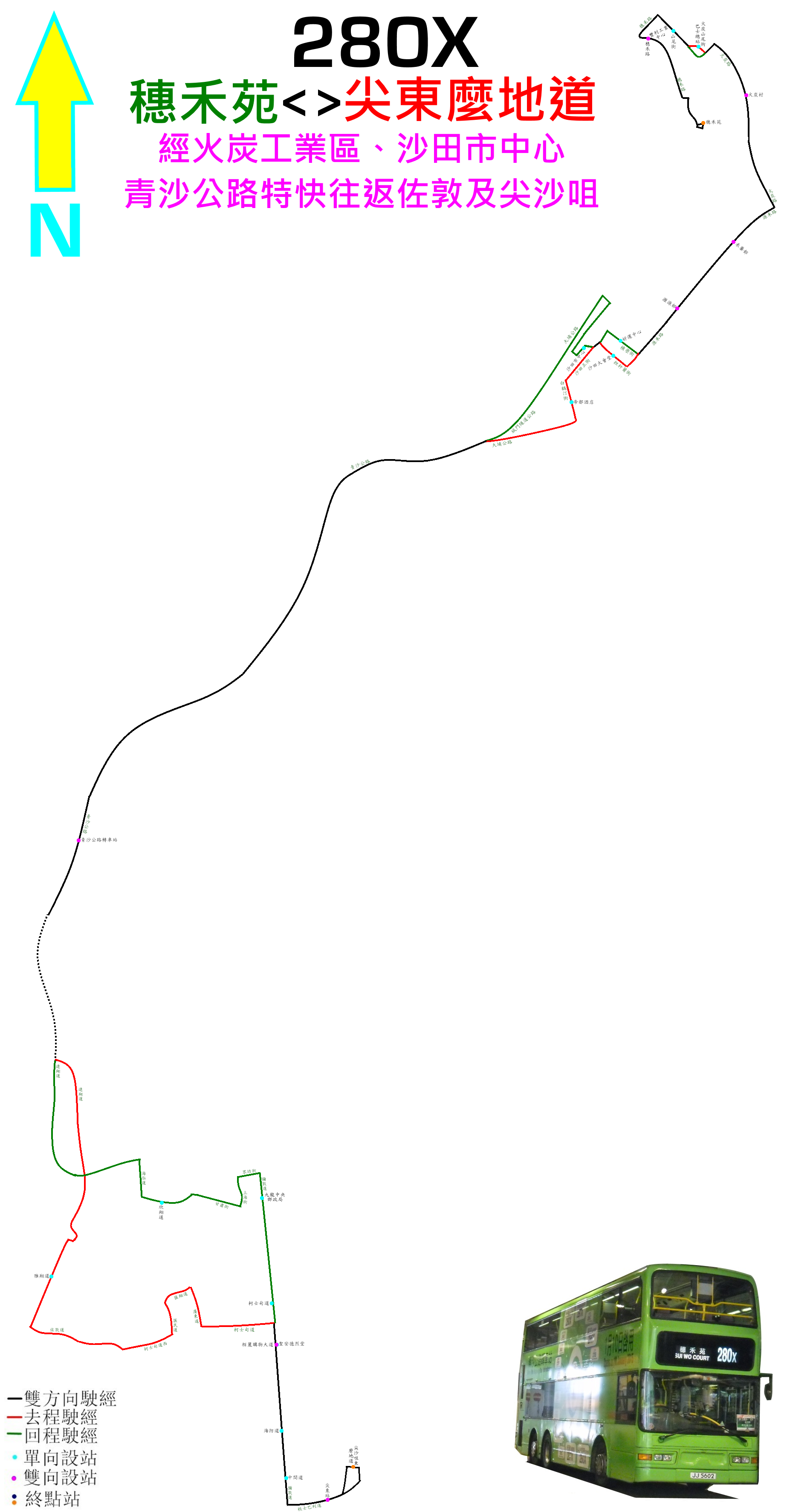 中文（香港）: 九巴280X線的走線圖